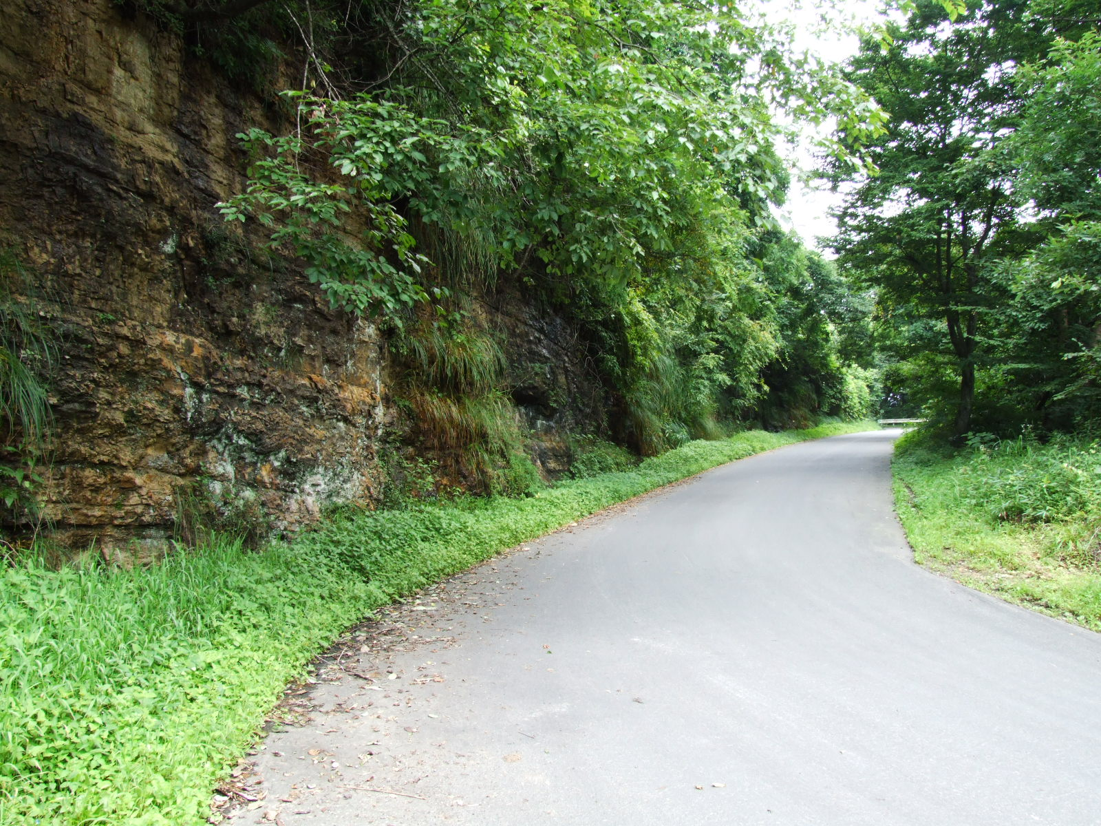 Nokawa Slope. Kumagane, Sendai, Miyagi prefecture, Japan.